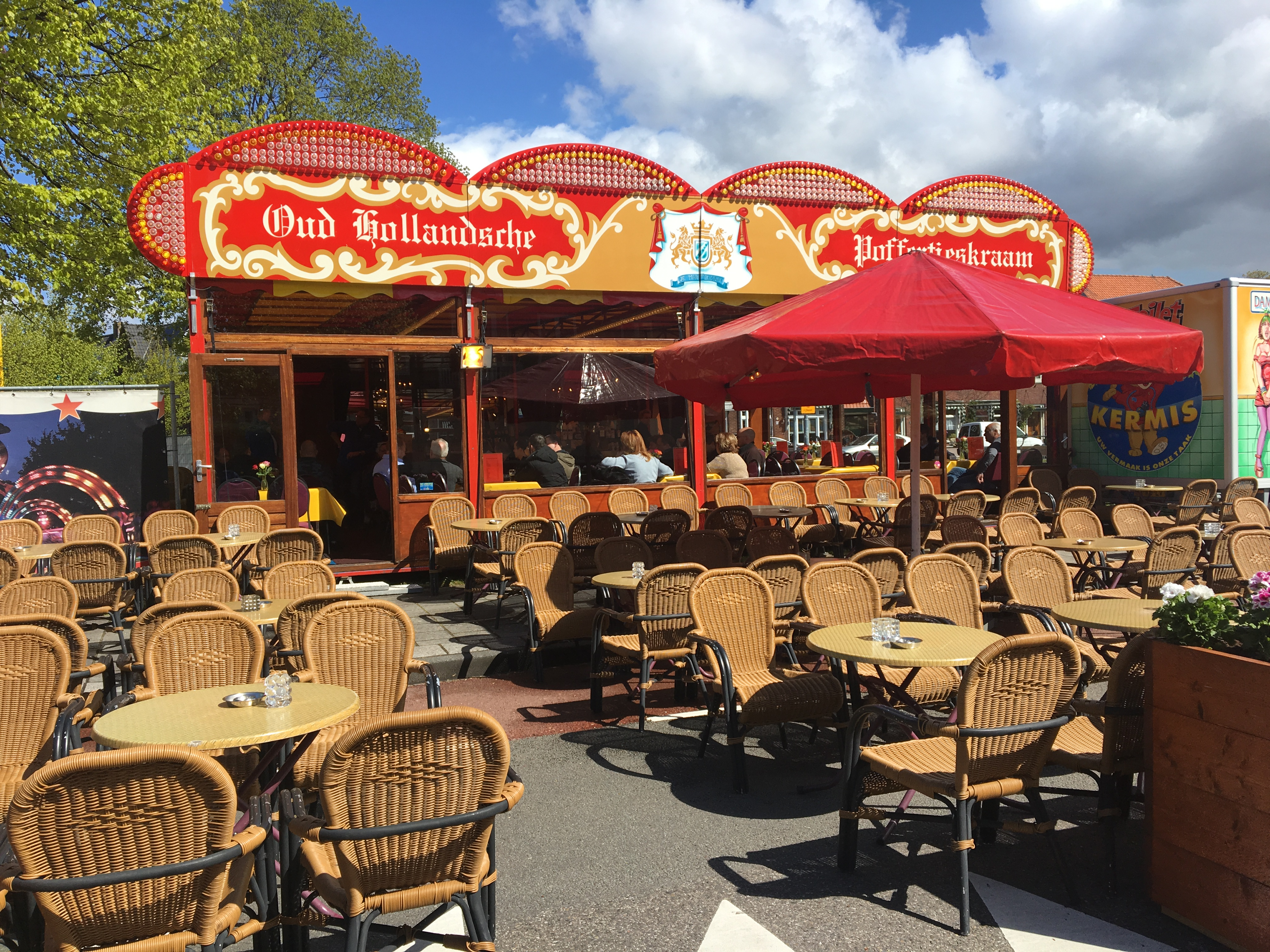 Poffertjeskraam op kermis Zaanenpark in Haarlem. Voorafgaand aan de opening van de kermis komen de kermisexploitanten bijeen.